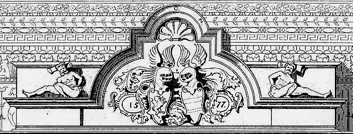 Zeichnung eines relief-verzierten Sandsteinkamins auf Schloss Hugenpoet in Essen-Kettwig